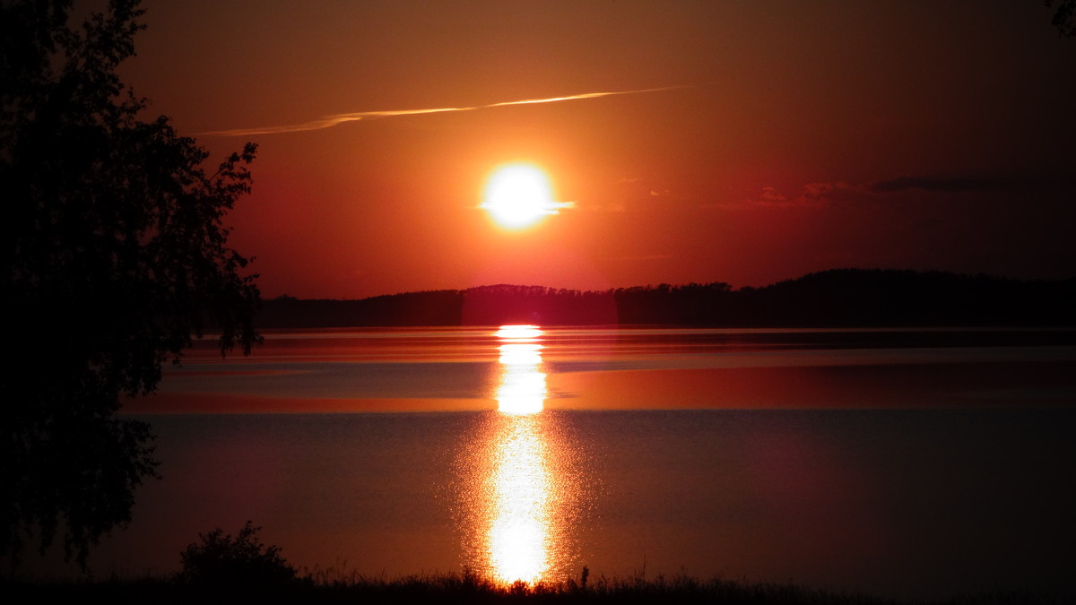 Кандры-Куль, Туймазинский район This image is related to the protected area of Russia number 0210213